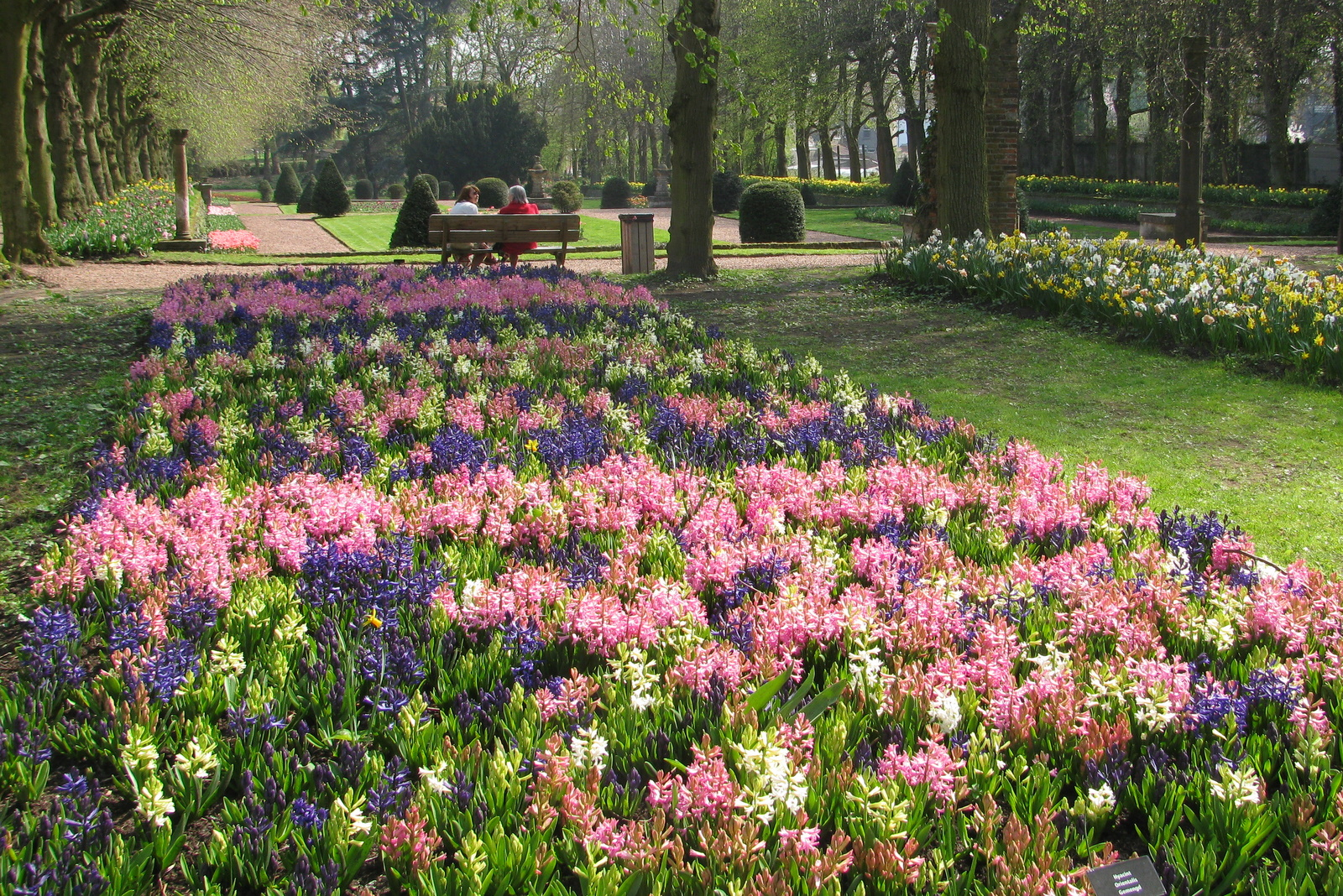 Flower Festival at Groot-Bijgaarden castle